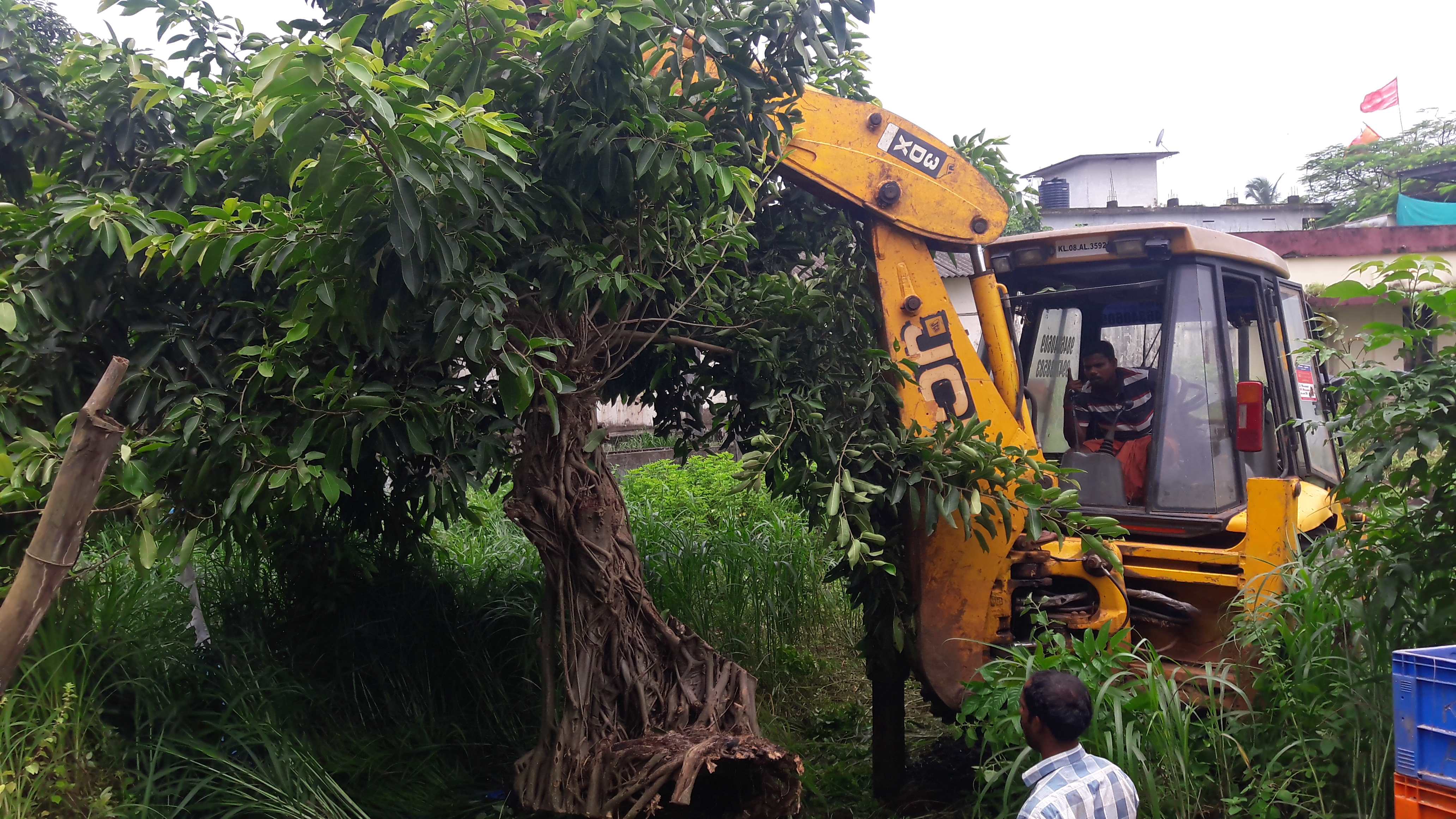 തൃശൂര്‍ ജില്ലയിലെ ചാവക്കാട് താലൂക്കിലെ ബ്ലാങ്ങാട് ബീച്ചിലുള്ള പഴയ ഒരു ഐസ് പ്ലാന്റിന്റെ മതിലിന്‍ മേല്‍ വളരുന്ന ഒരു കൊയലി മരത്തെ പ്ലാന്‍റ് വില്ലേജ് ചാരിറ്റബിള്‍ സൊസൈറ്റി എന്ന നേച്ചര്‍ ക്ലബ് പറിച്ചു നടല്‍ പ്രക്രിയ വഴി മറ്റൊരു സ്ഥലത്തേക്ക് മാറ്റി നടുന്നു.